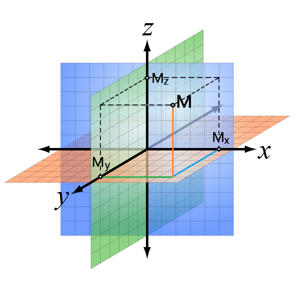 Cartesian coordinate system. Ox is the abscissa axis, Oy is the ordinate axis, Oz is the applicate axis. The Cartesian rectangular coordinates x, y, and z of the point M are the values of the directed segments OMx, O My, and O M z. Декартова система координат. Ox — ось абцисс, Oy — ось ординат, Oz — ось аппликат. Декартовыми прямоугольными координатами x, y и z точки М называются величины направленных отрезков ОМx, O My и O M z.